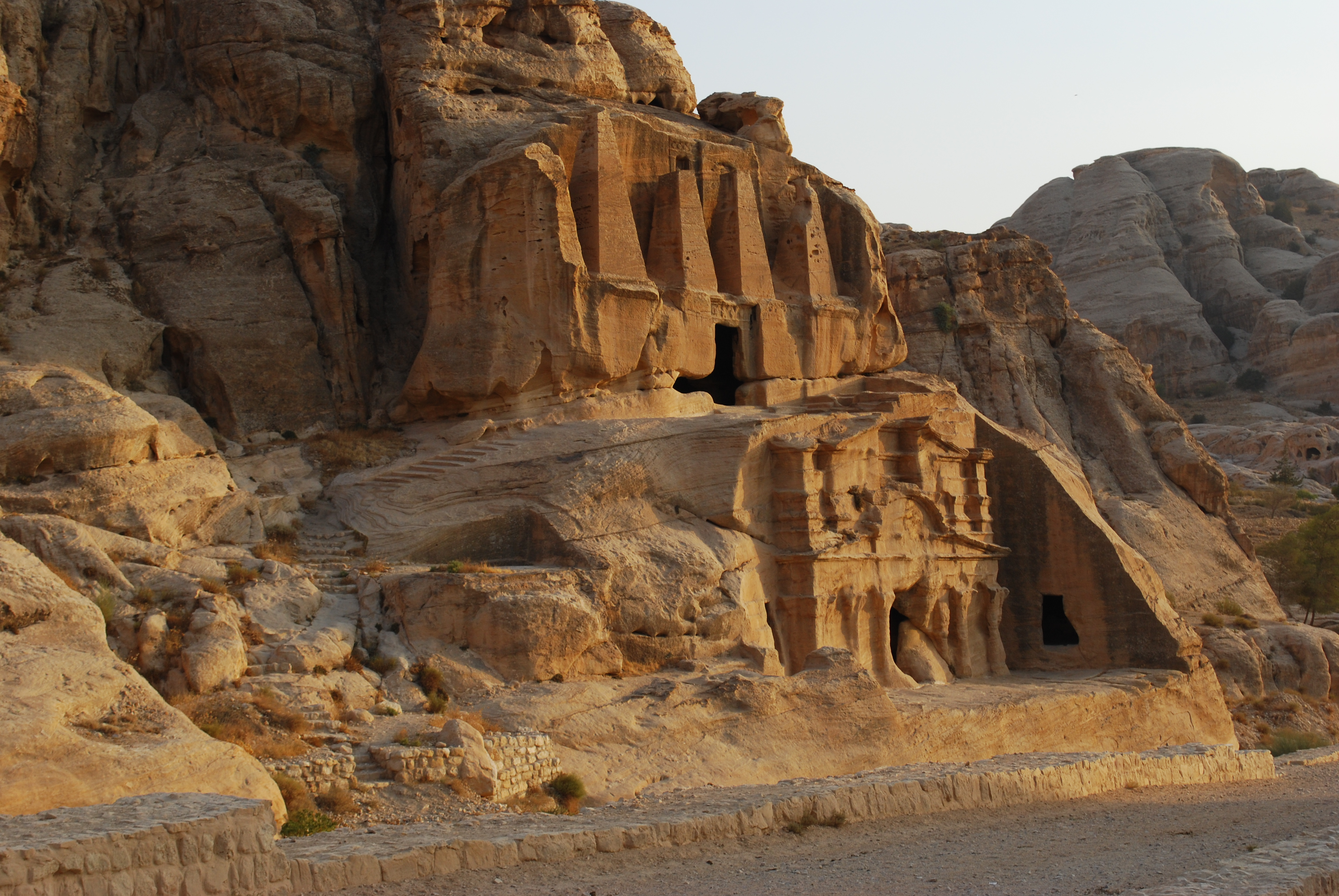 Le mausolée aux obélisques à Pétra.